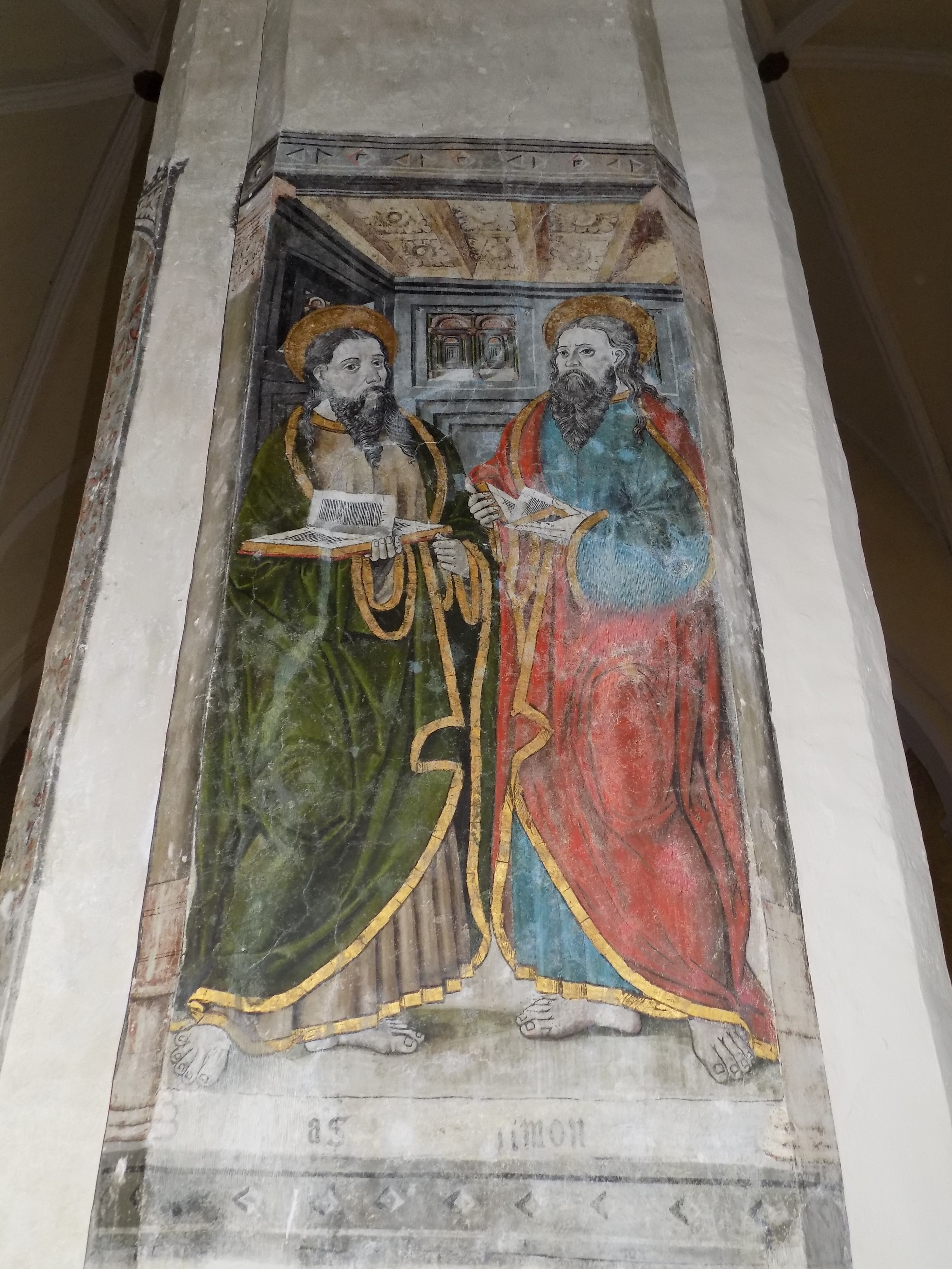 Pintura mural en el interior de la iglesia de Nuestra Señora del Castillo de Fuente Obejuna, provincia de Córdoba, (España).